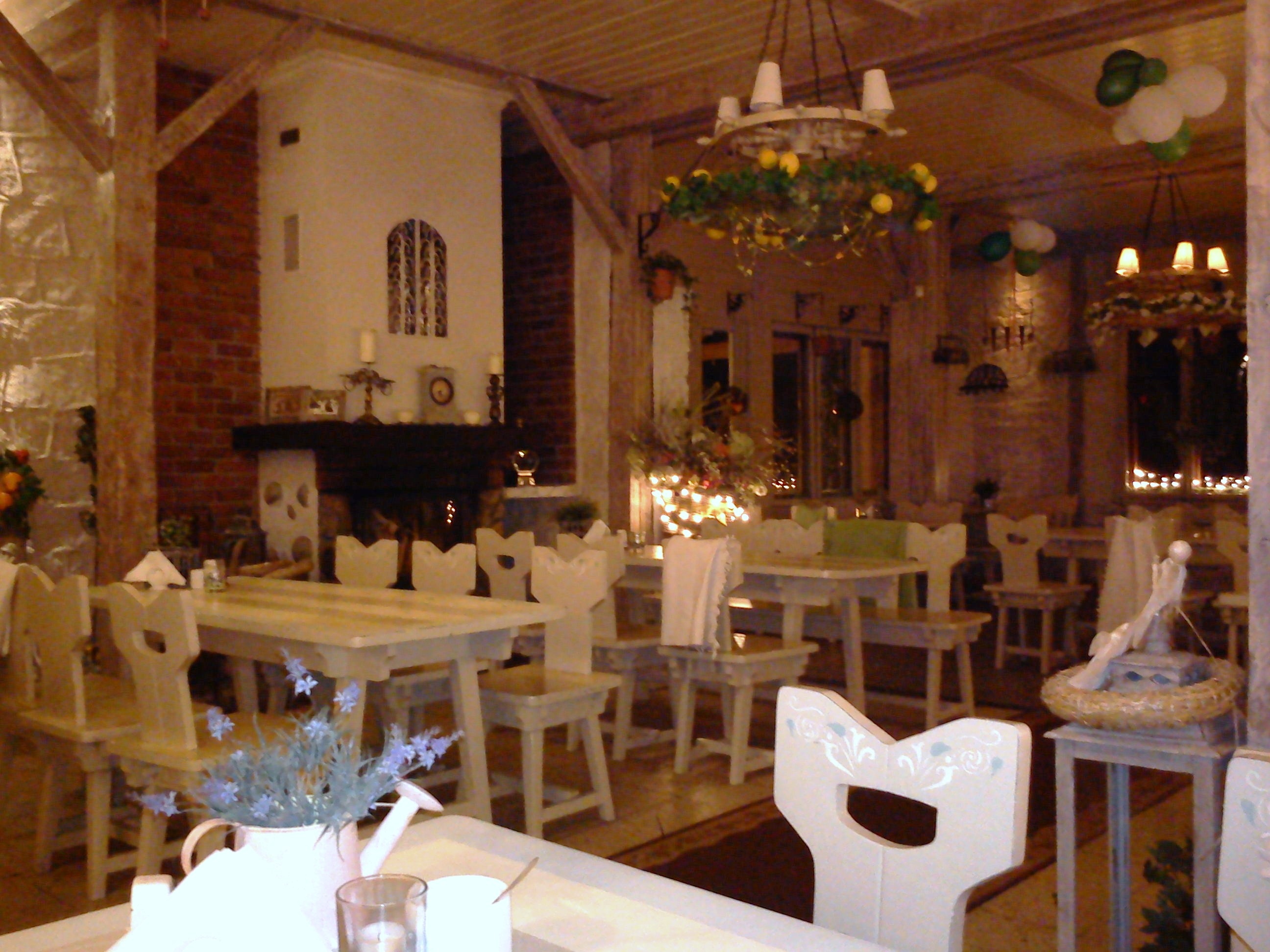 Hotel (Gościniec) - Promno.